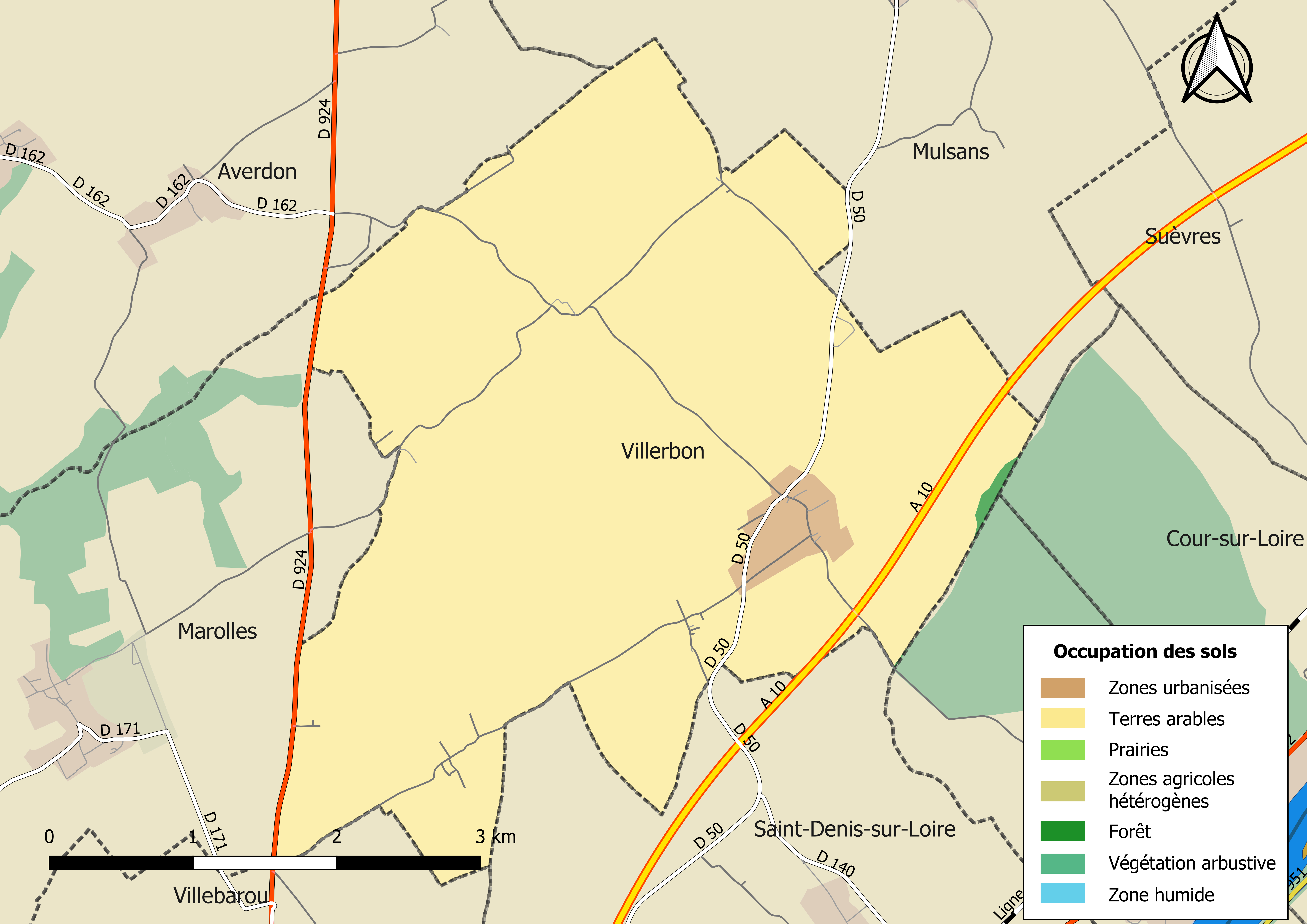 Carte des infrastructures et de l’occupation des sols en 2018 de la commune de Villerbon (France).